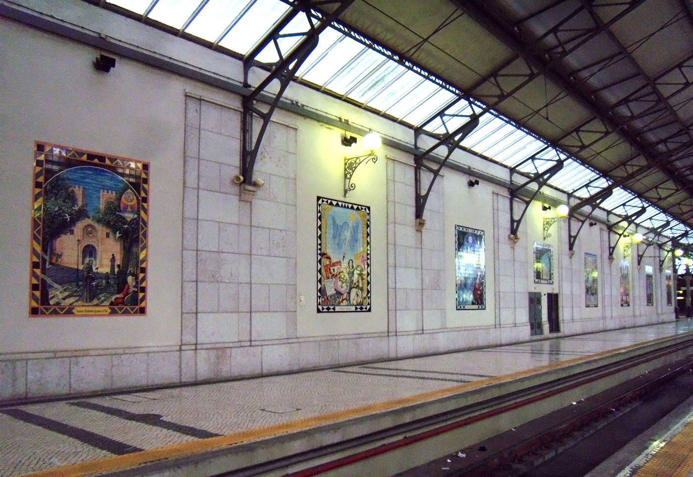 На вокзале Россиу